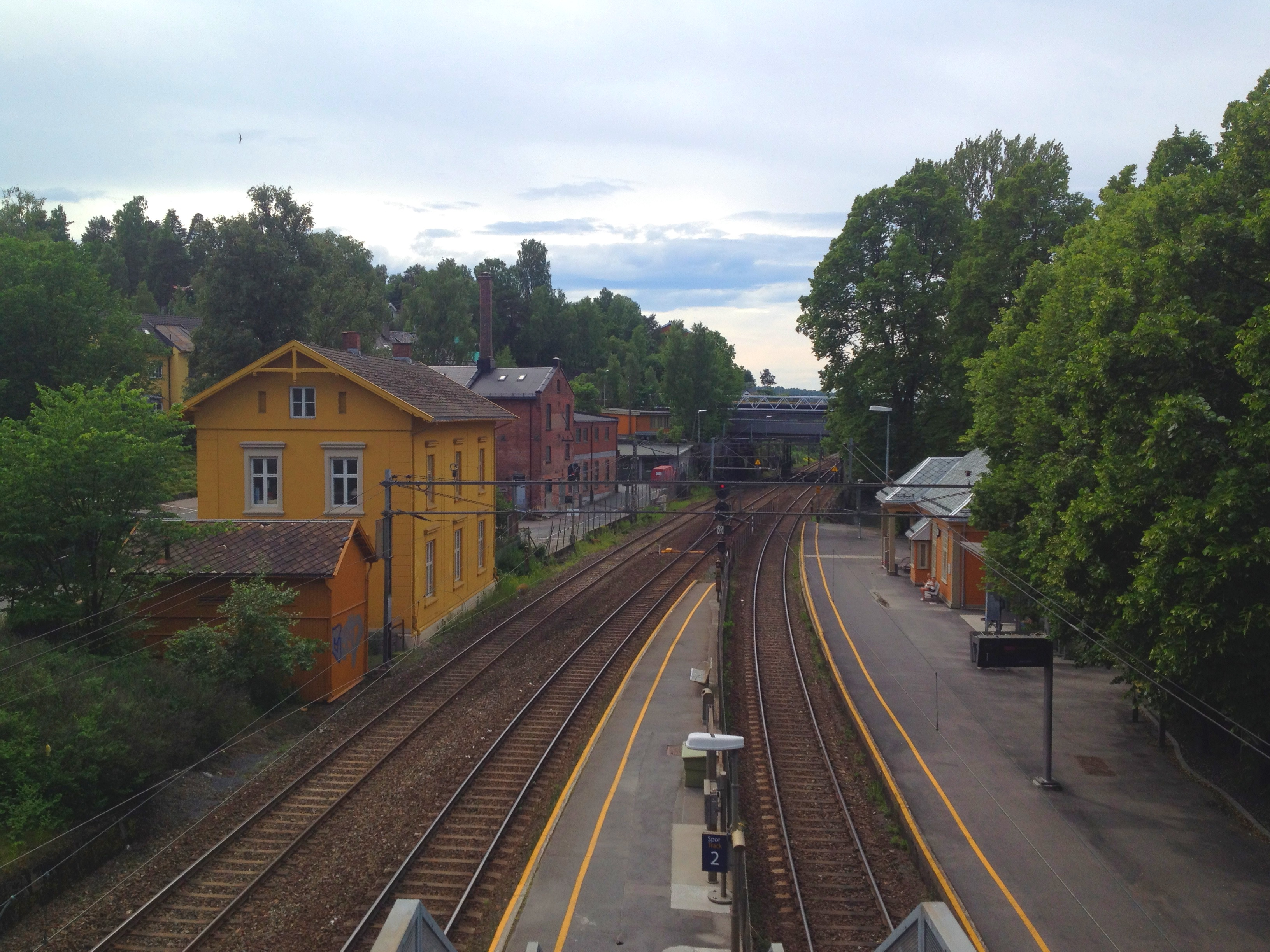 Bryn stasjon i Oslo.